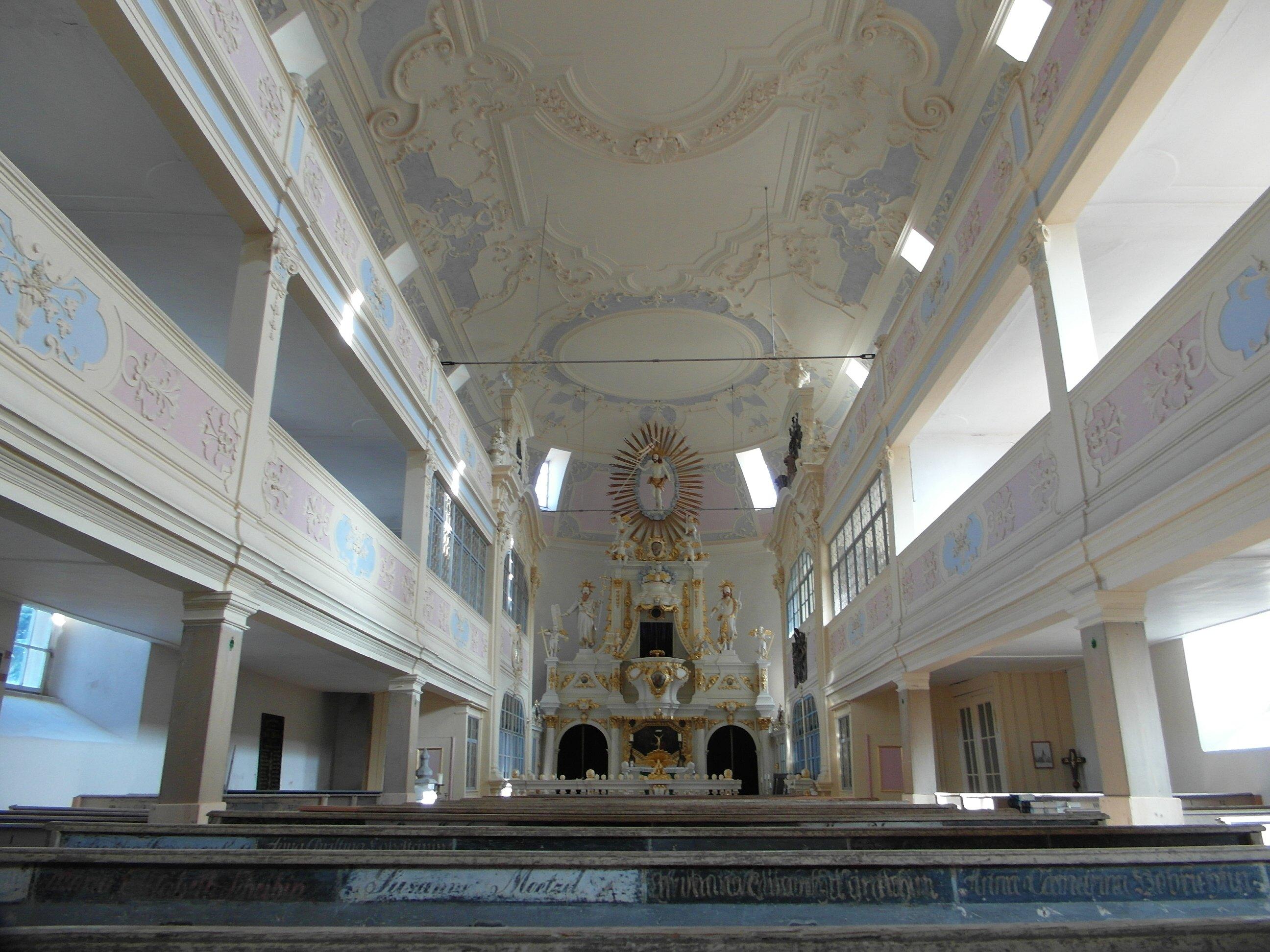 St. Georg (Großneuhausen), Kleinod der Kirchenbaukunst, Kirchenbänke mit den Namen der Familien aus dem Ort. Im Kirchenschiff unten saßen die Frauen, auf der ersten Empore die Männer.